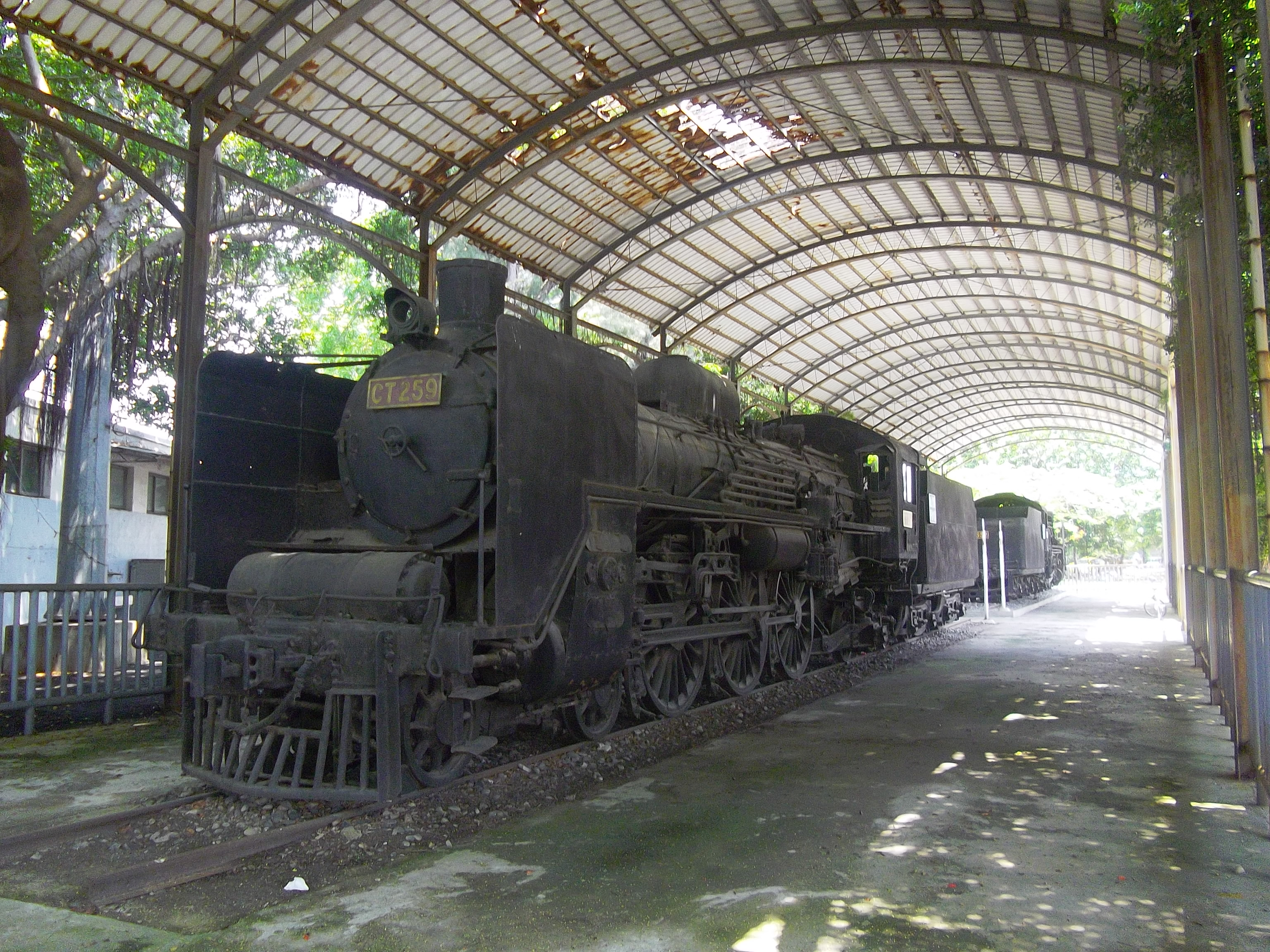 體育公園裡的蒸氣火車頭